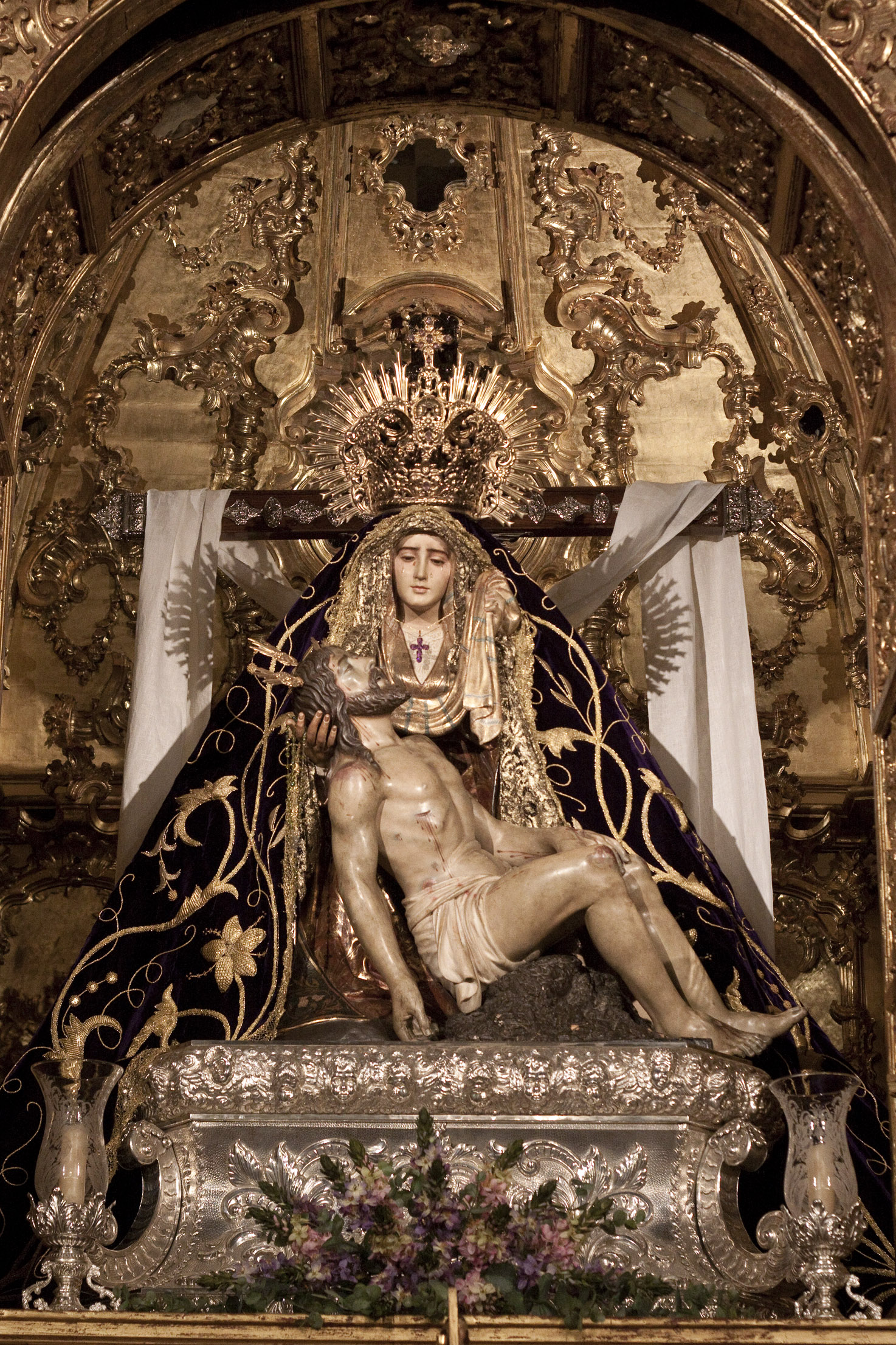 Ntra Sra de las Angustias de Ayamonte. Parroquia de las Angustias. 2009.